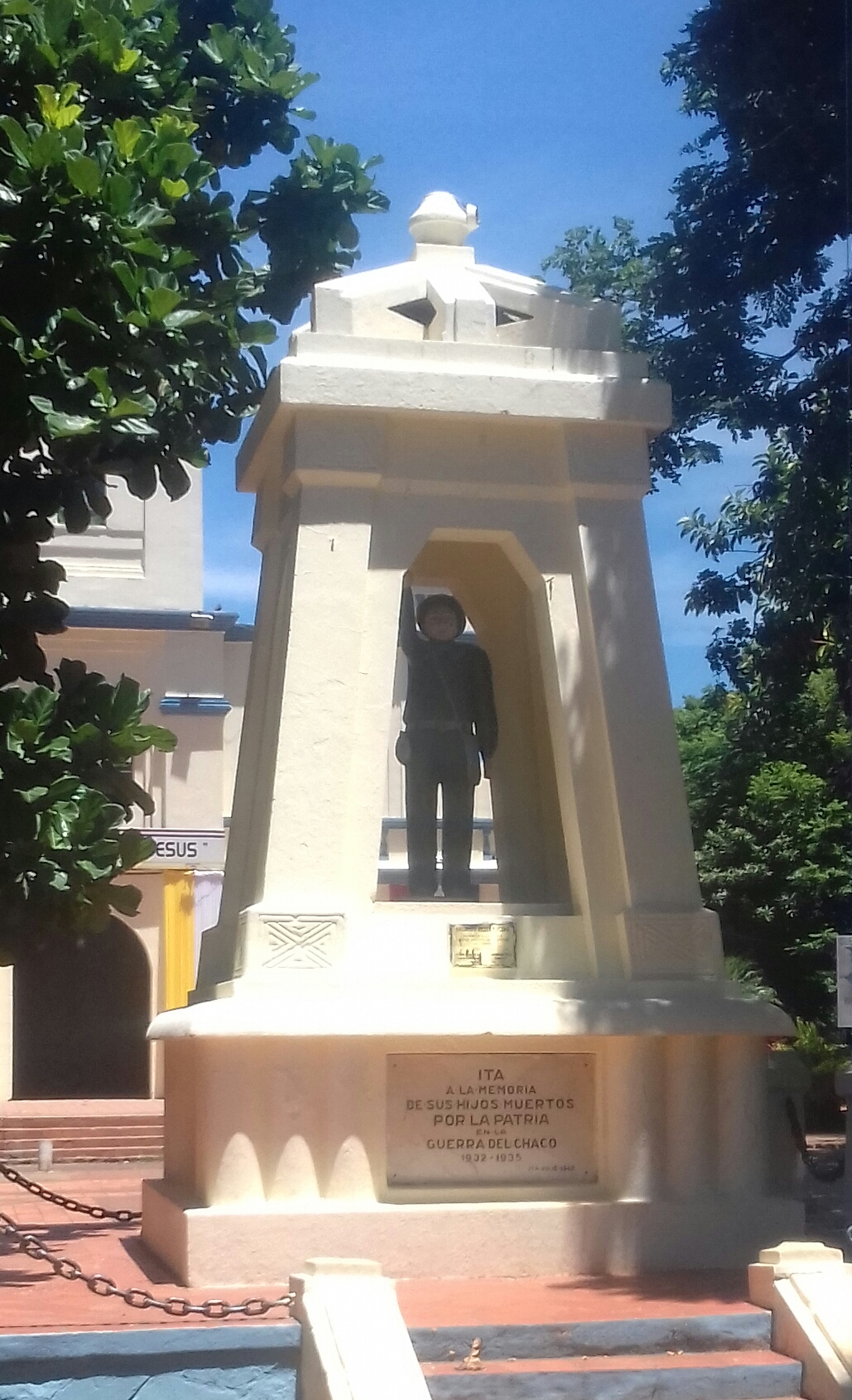 Entre las varias obras que realizó el pintor y escultor Adan Kunos (1890- 1979), se encuentra monumento escultórico a los héroes caídos en la guerra del Chaco de la ciudad de Itá, Paraguay. Kunos nació en una pequeña aldea de Hungría, Oroshaza; sus estudios primarios y secundarios los realizó en este lugar que en aquel entonces era predominantemente agrícola y de unos 30.000 habitantes y posteriormente en Budapest, en la Real Academia Superior de Artes Industriales, especializándose en pintura, escultura y arquitectura, actividades que, a juzgar por su variada obra artística, desarrolló a lo largo de su vida. Vino a América en 1929, primeramente estuvo en San Pablo (Brasil) donde trabajó en “Litographia Ipiranga” y luego se trasladó al Paraguay en 1931, donde vivió hasta su muerte.